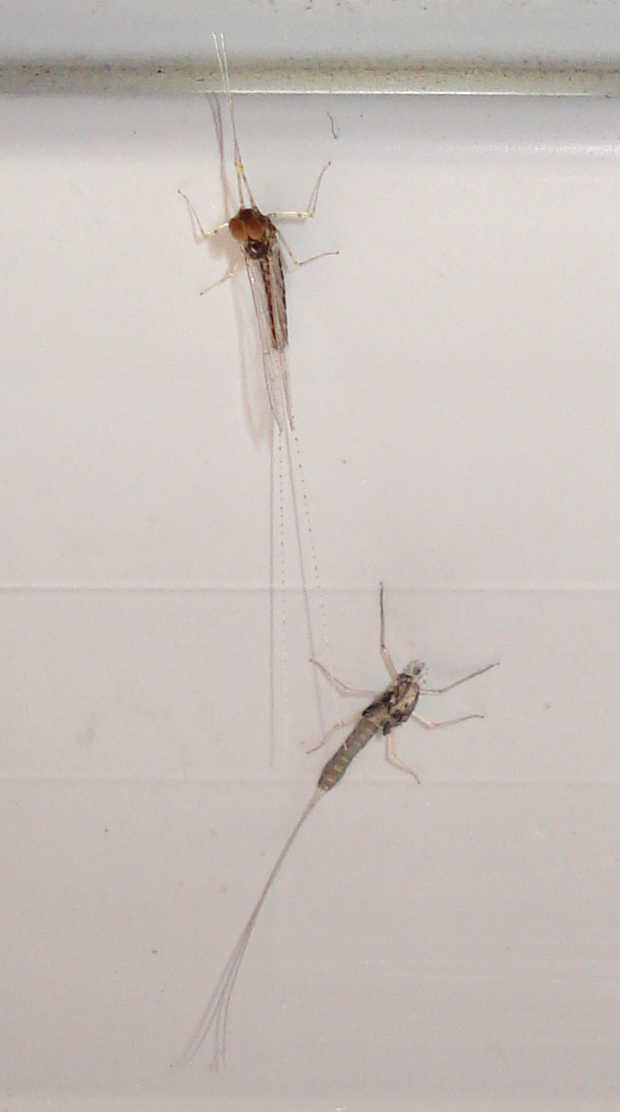 Una Effimera e il suo fantasma sùbito dopo la muta.